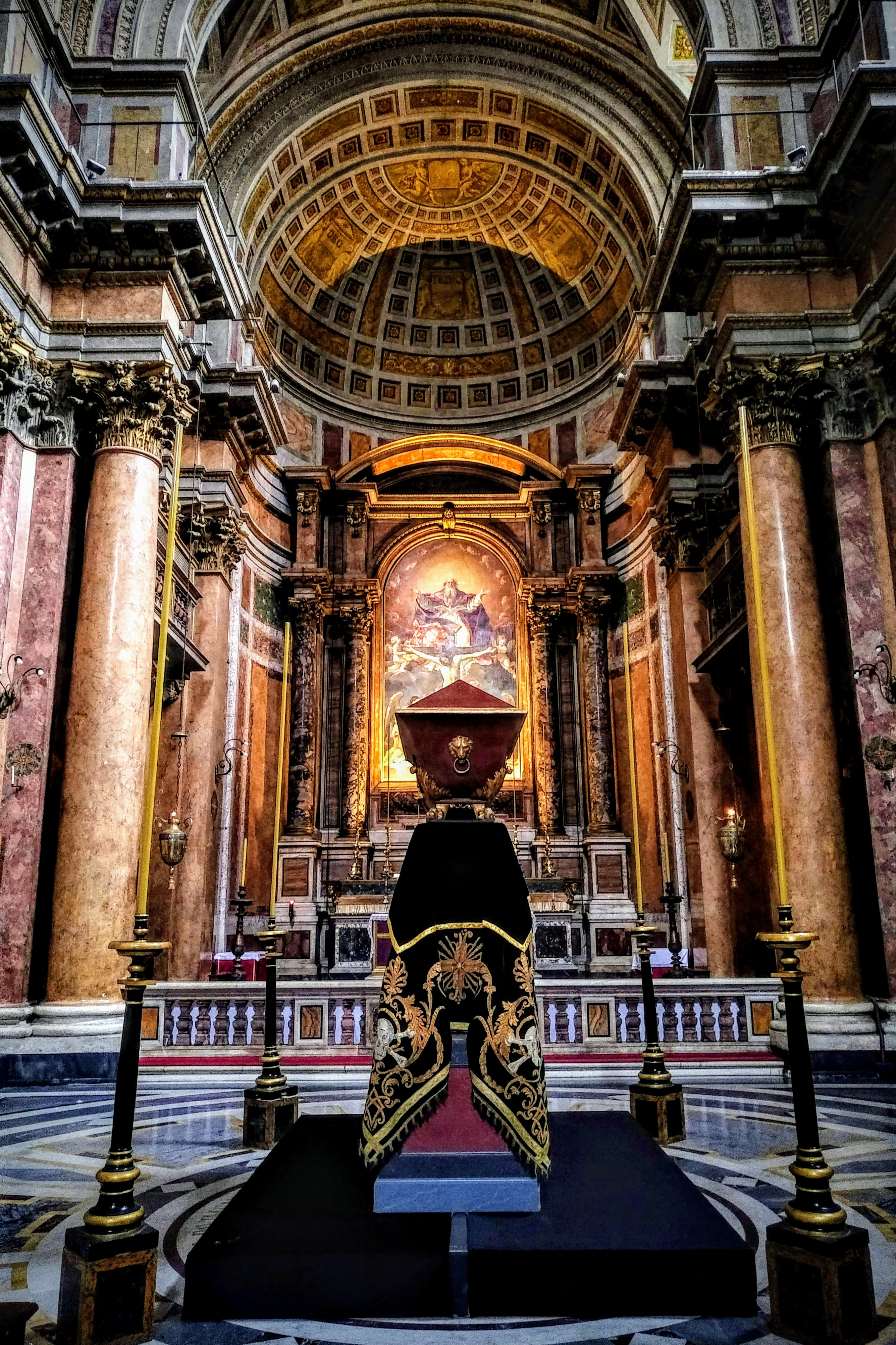 Commemorazione dei Defunti